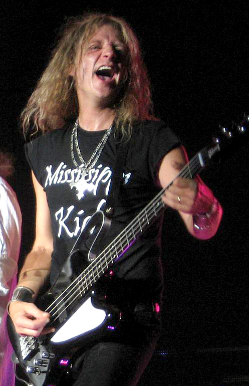 Ean Evans, fallecido bajista de Lynyrd Skynyrd, actuando en 2008.